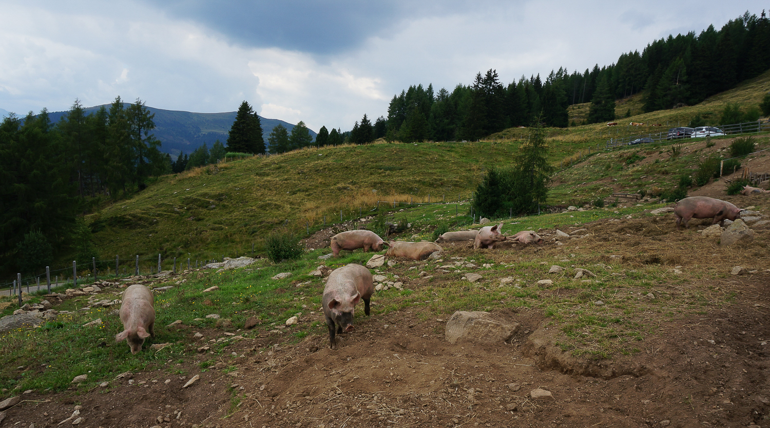 Bei der Lammersdorfer Hütte auf 1650 m Seehöhe in Millstatt werden Schweine im Sommer im naturnahen Lebensraum, im Freien, gehalten.